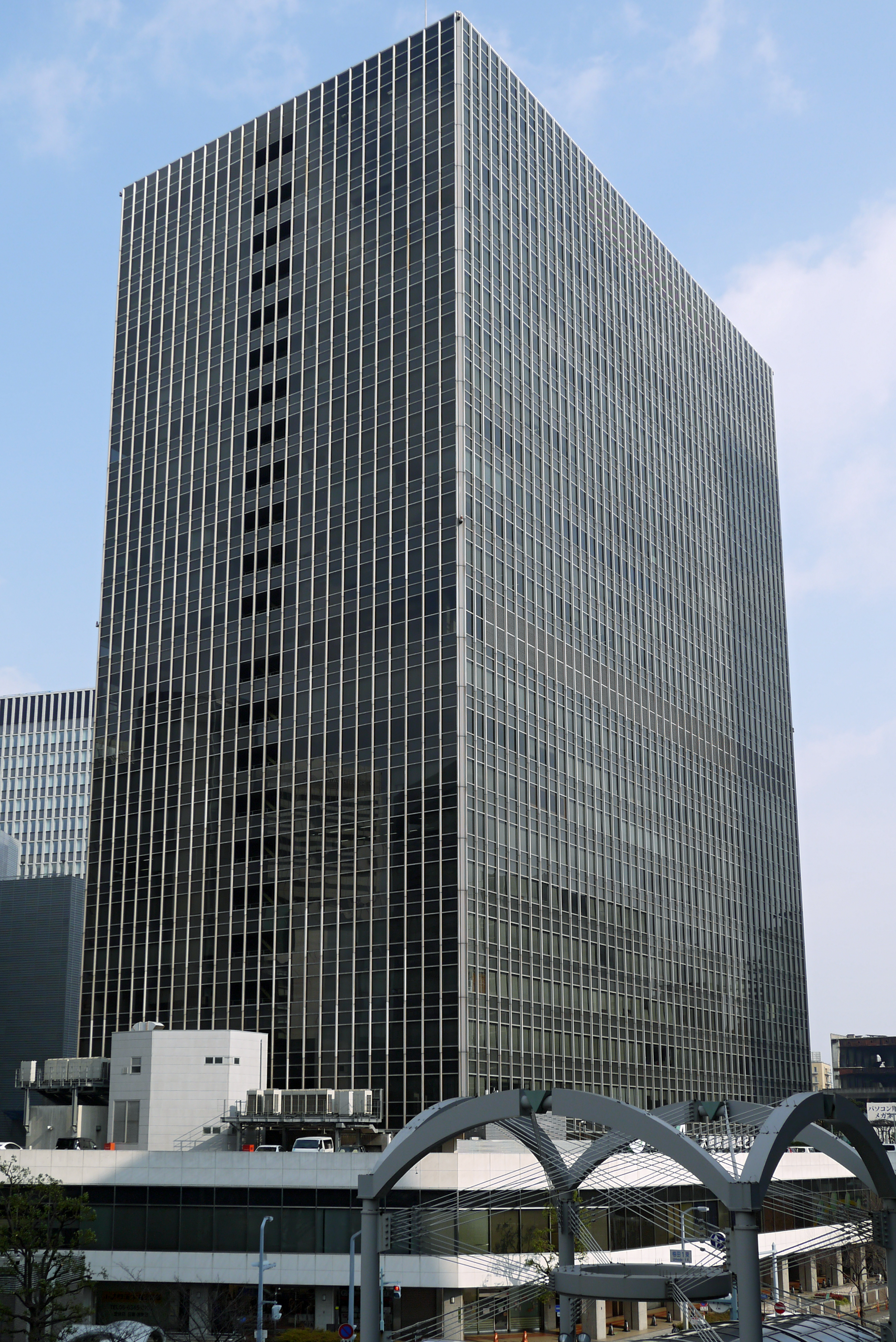 Osaka Ekimae Building No.4 (大阪駅前第4ビル), Osaka, Osaka prefecture, Japan